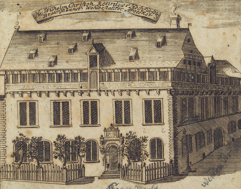 Die Hagenmarktapotheke in Braunschweig.